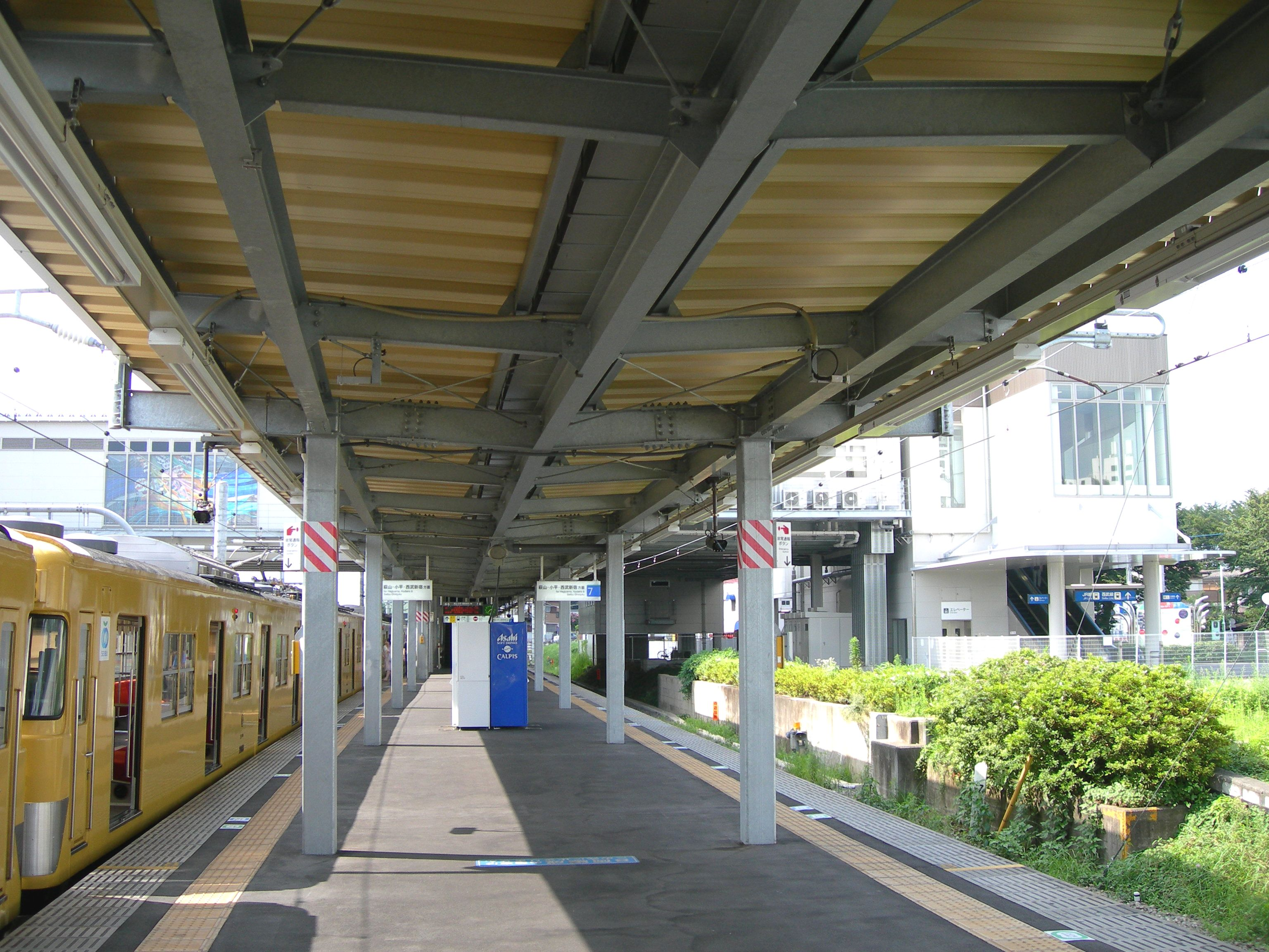 拝島駅６番・７番ホーム(西武線用ホーム)